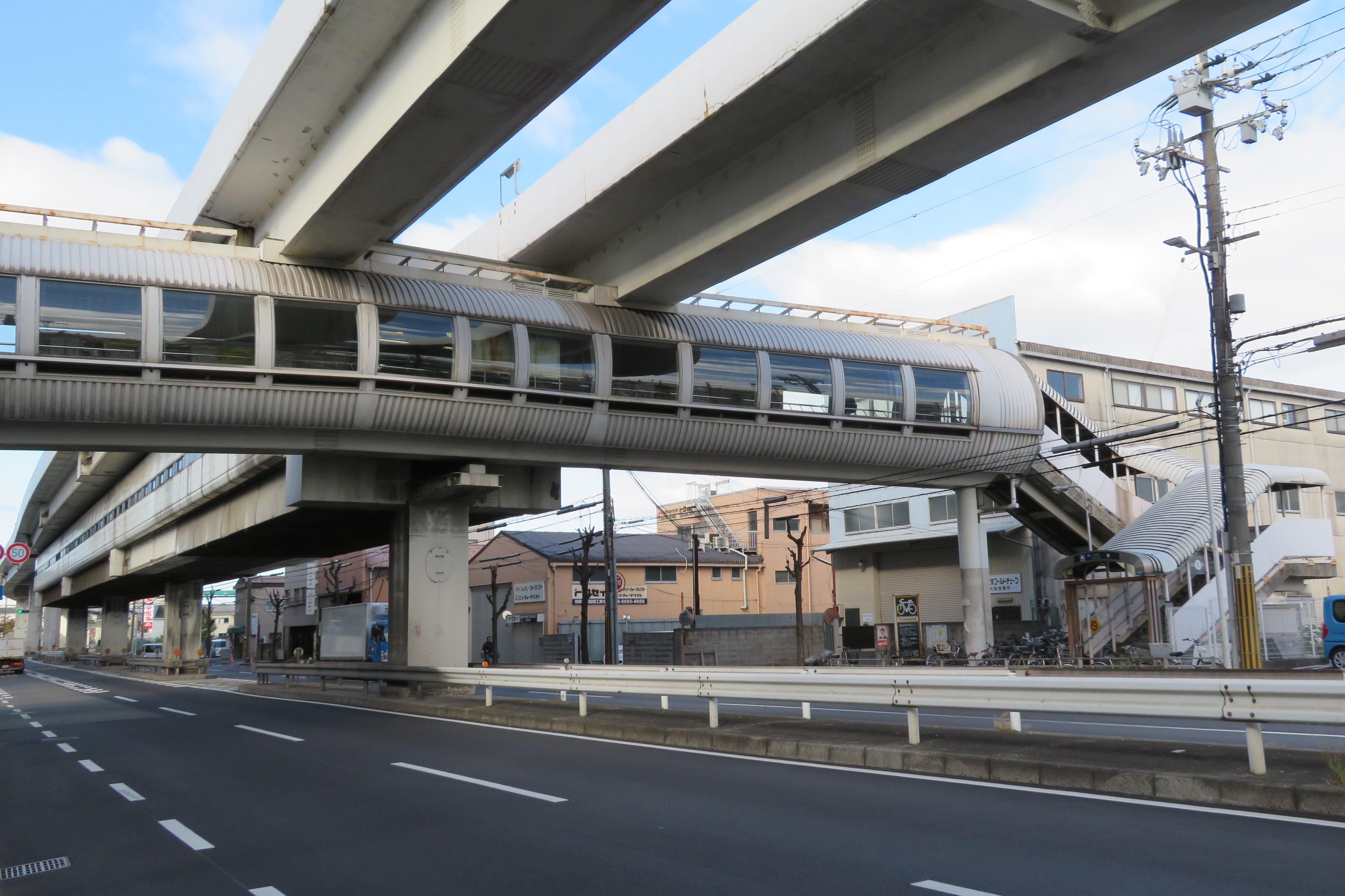 平林駅 (大阪府)